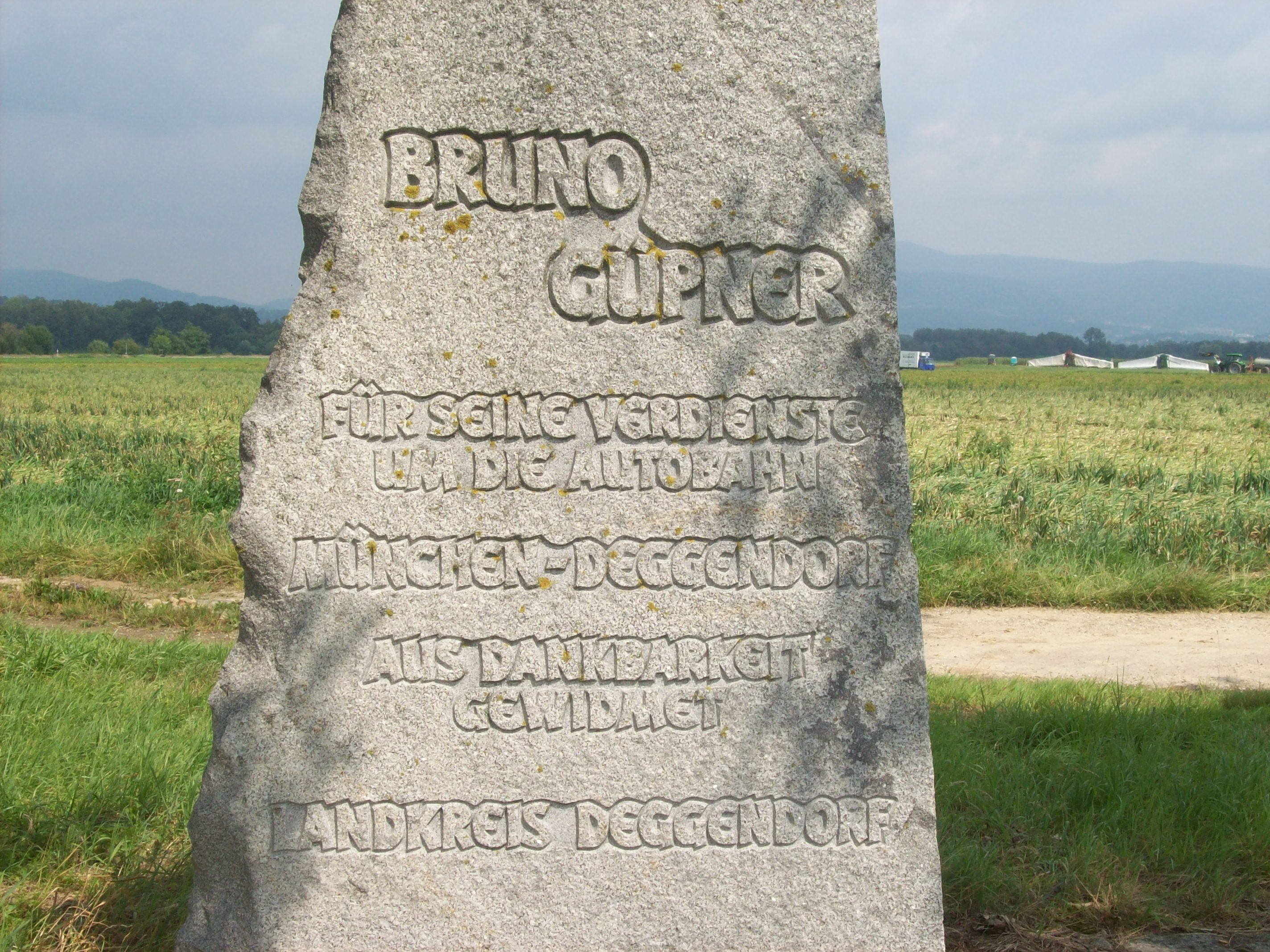 Gedenkstein für Bruno Güpner, A92, Ausfahrt Plattling Nord.